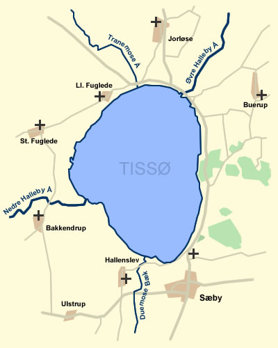 En oversigt over Tissø, til- og afløb og de omkringliggende byer